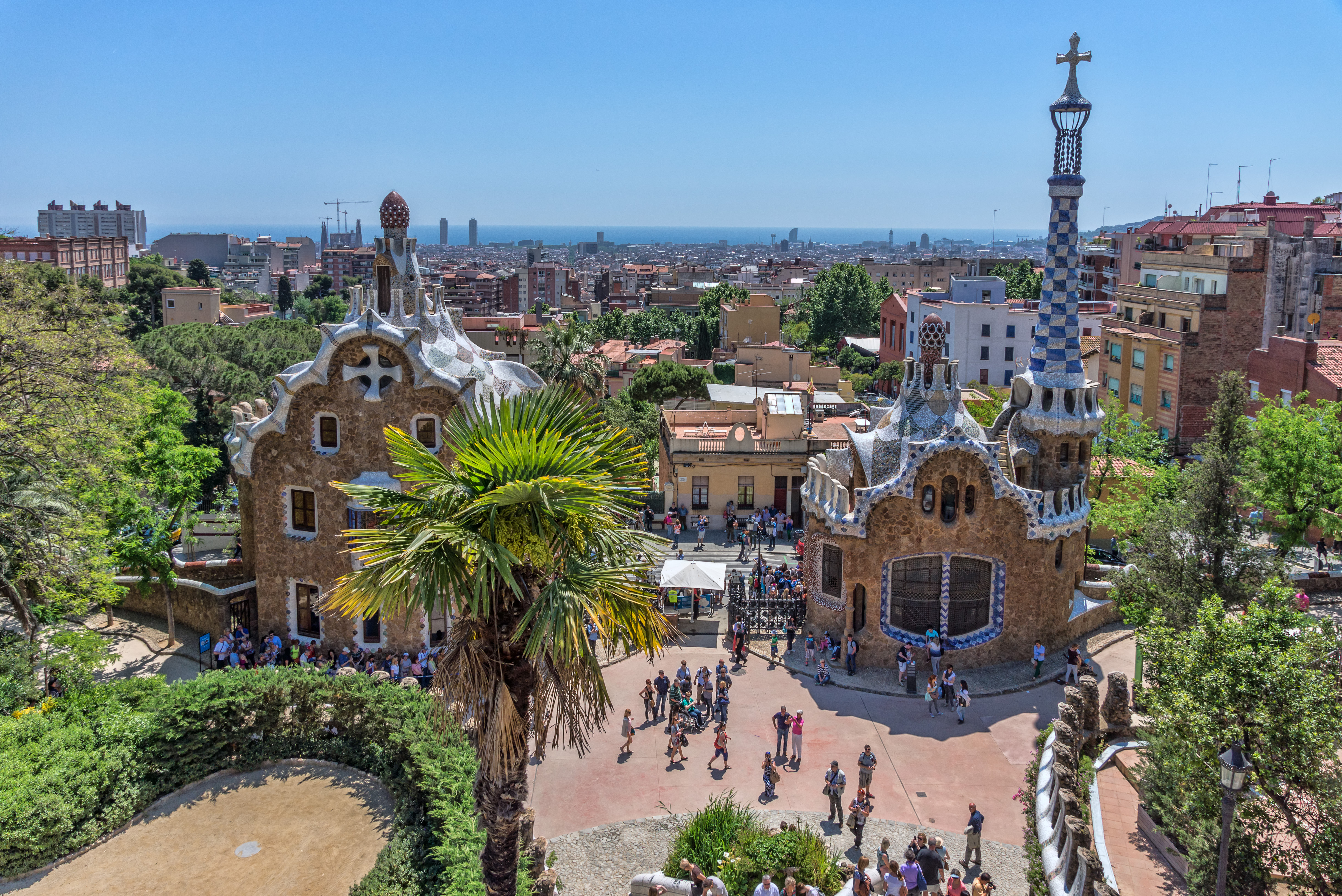 Maisons à l'entrée du Parc Güell, réalisées par Antoni Gaudi, Barcelone, Espagne